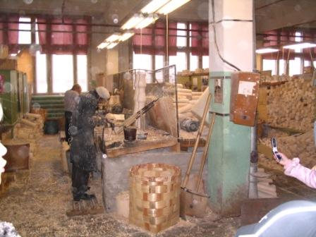 Вытачивание заготовок для хохломской росписи